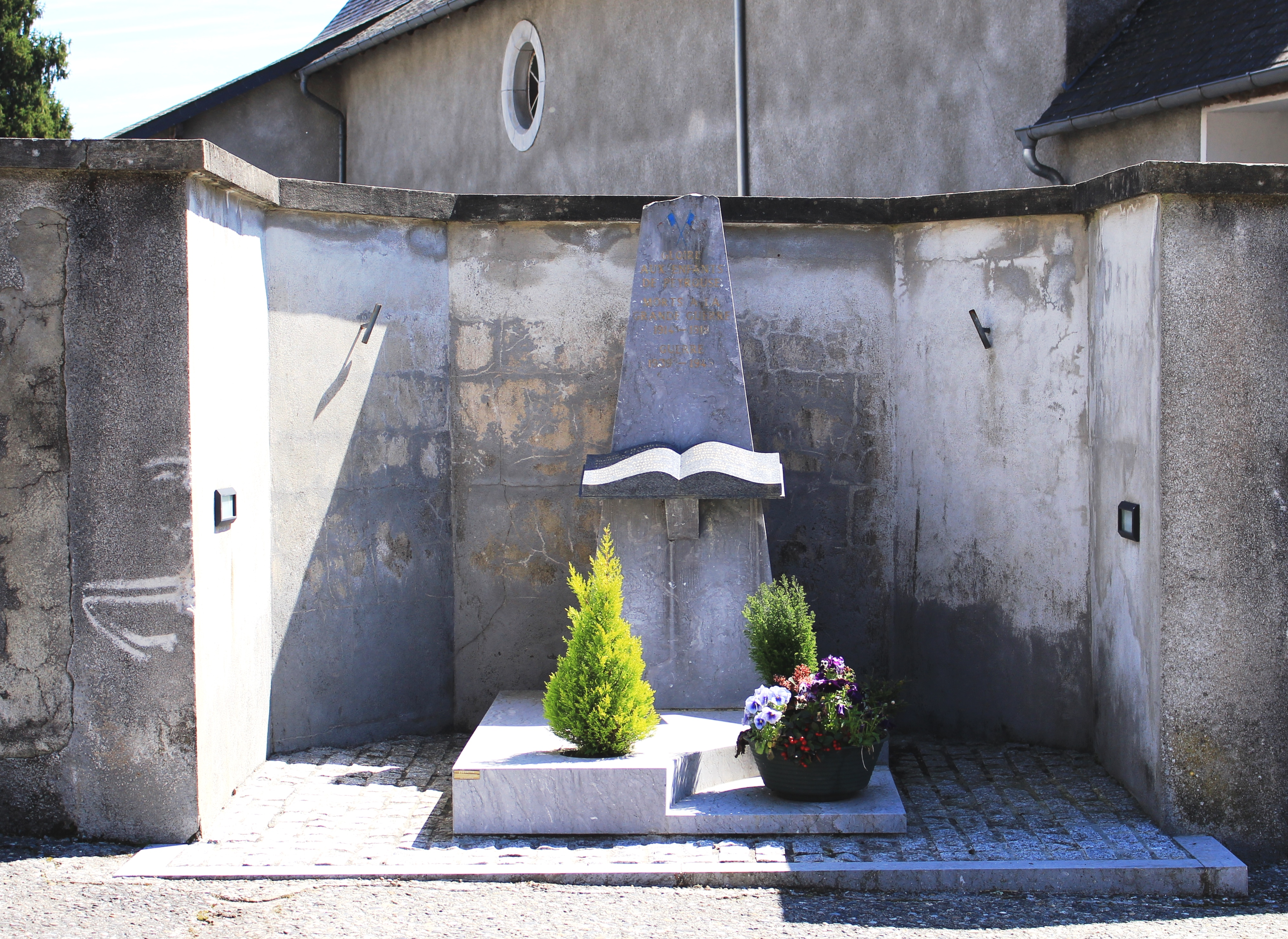 Monument aux morts de Peyrouse (Hautes-Pyrénées)